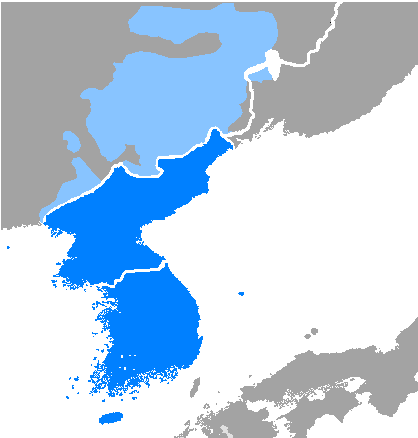 idioma coreao.